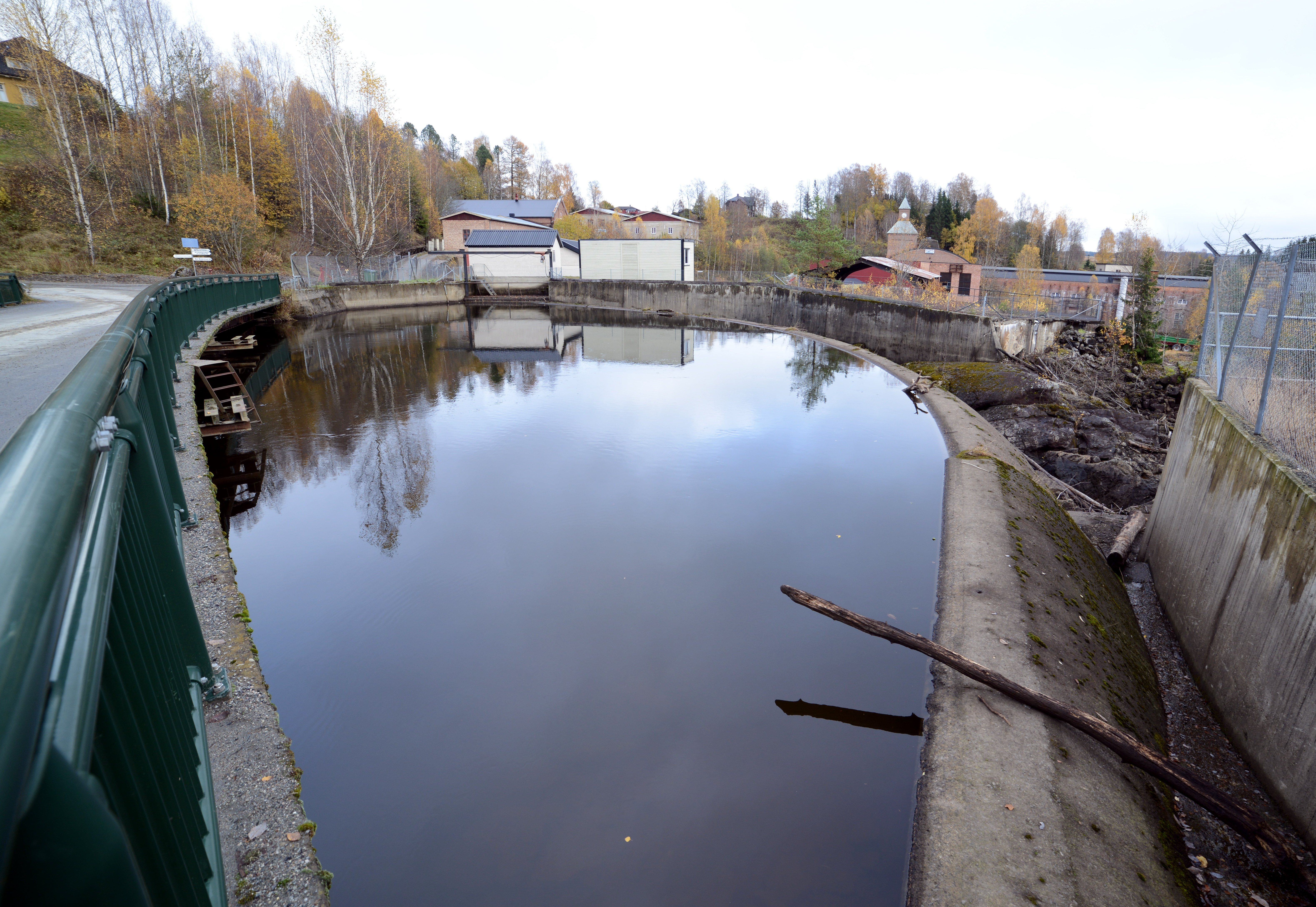 Demingen ved Bønsdalen kraftverk fra oversiden.